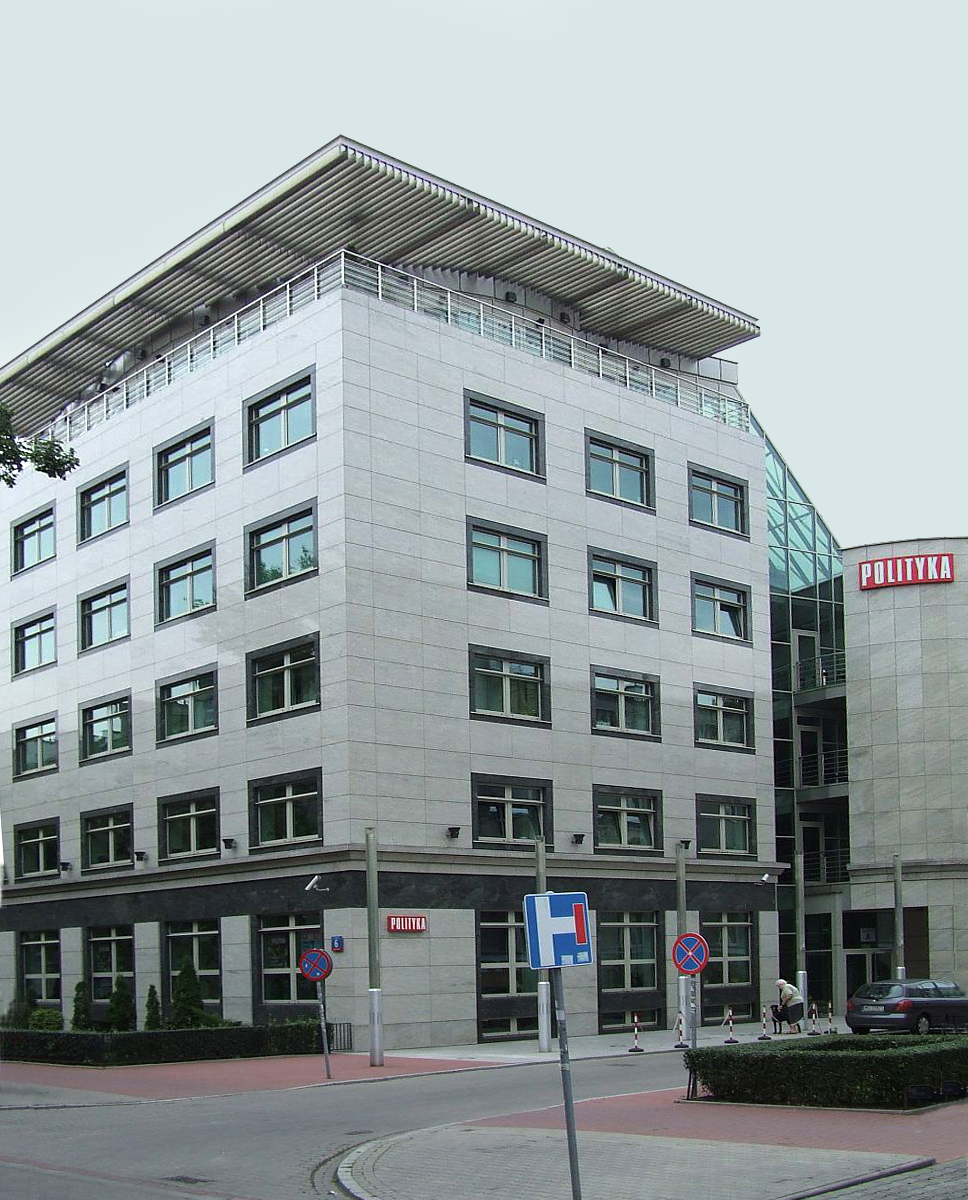 Headquter of Polityka (tygodnik), Warsaw, ul. Słupecka 6